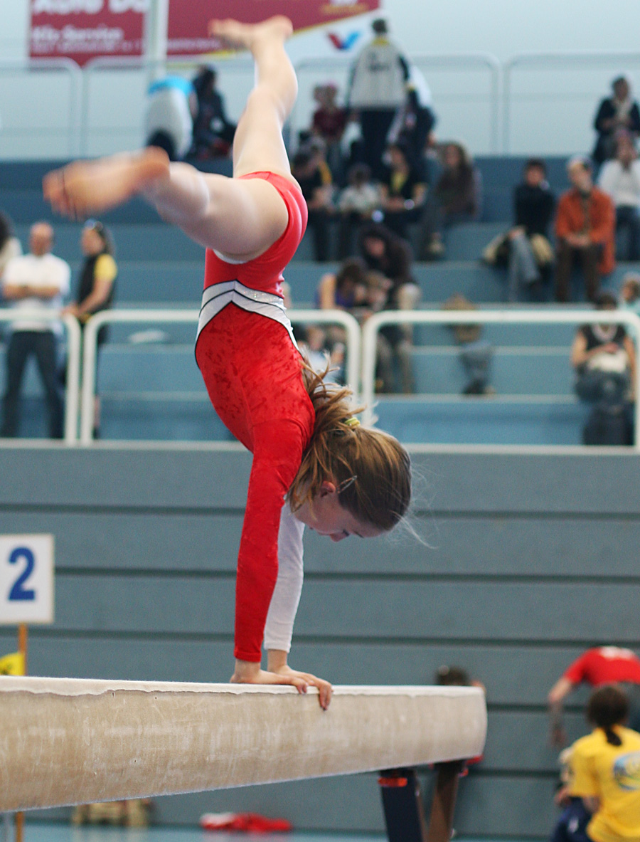 Turn10-Wettkampf 2008 in Hard/Vorarlberg/Österreich